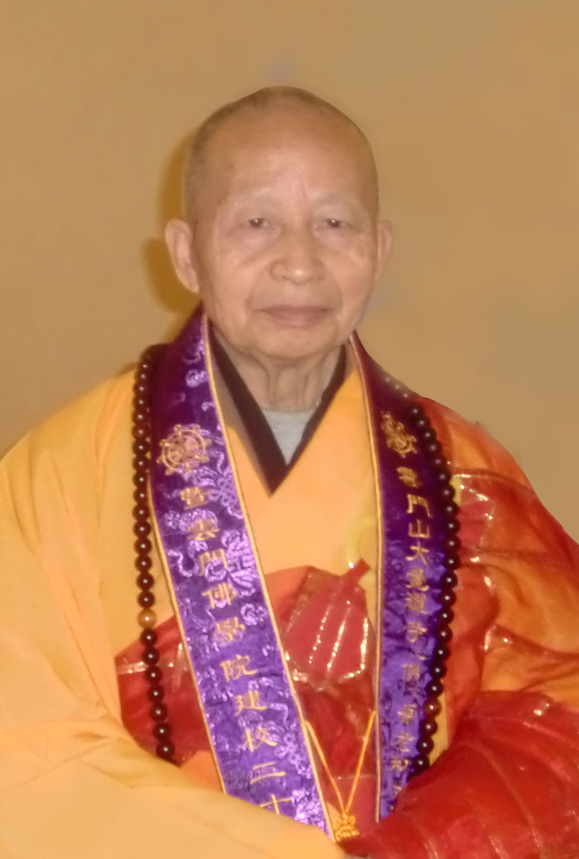 禅道长老于云门佛学院